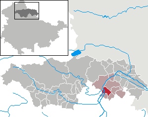 Gorsleben in Thuringia - Kyffhäuserkreis